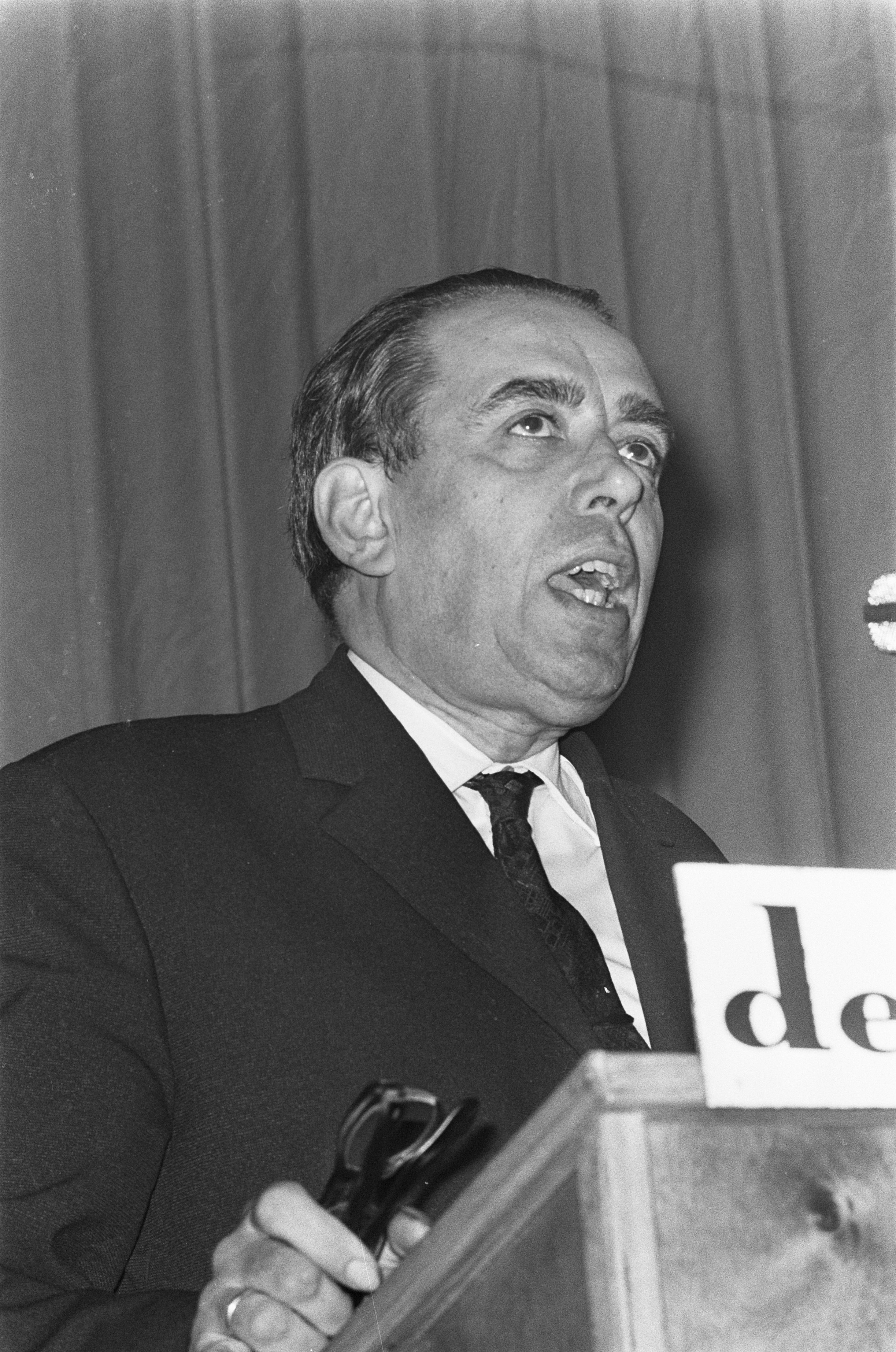 CDU-voorzitter Zeegers tijdens zijn redevoering. (Christen-Democraten Unie) Plaats: Volkskrant-congres in het Scheveningse Kurhaus. Datum: 5 november 1966